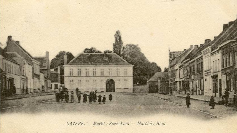 De plaats waar heden het gemeentehuis staat - Markt - Gavere - Oost-Vlaanderen - België